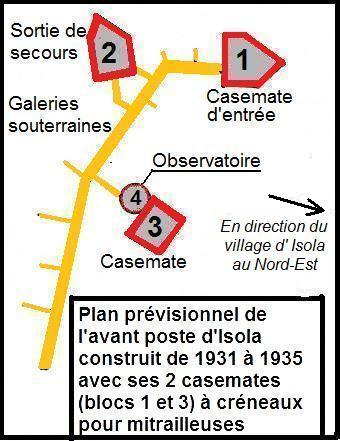 Plan prévisionnel de l'ouvrage d'avant-poste d'Isola faisant partie de la ligne Maginot des Alpes dans le secteur des Alpes-Maritimes (FRANCE)